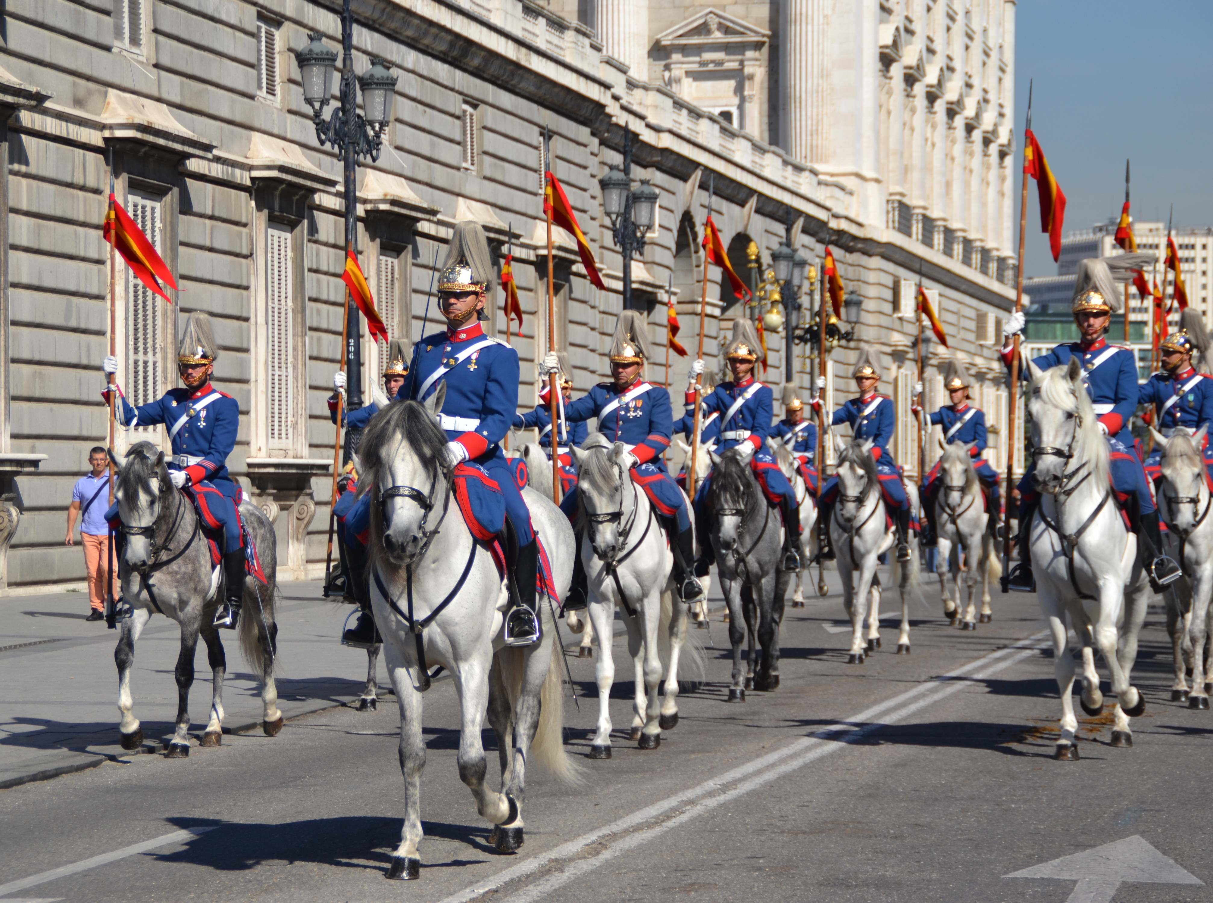 Lanceros